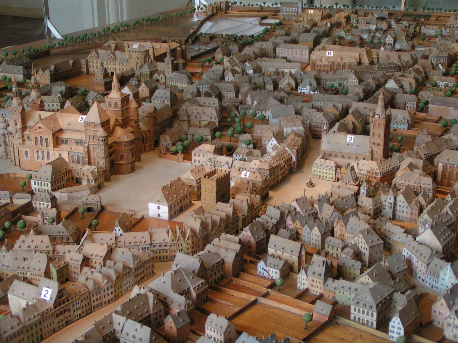 Trier Museum Simeonstift - Stadtmodell von Trier um 1800; in der Bildmitte ist nahe der Nr. 4 der Turm Jerusalem zu erkennen.